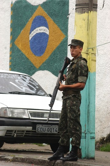 Soldado do Exército brasileiro.